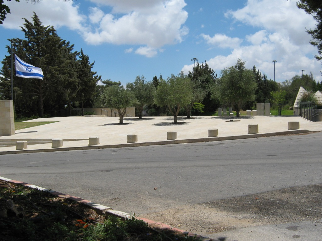 אתר ההנצחה ליהודי אתיופיה שניספו בדרכם לישראל, הר הרצל, ירושלים